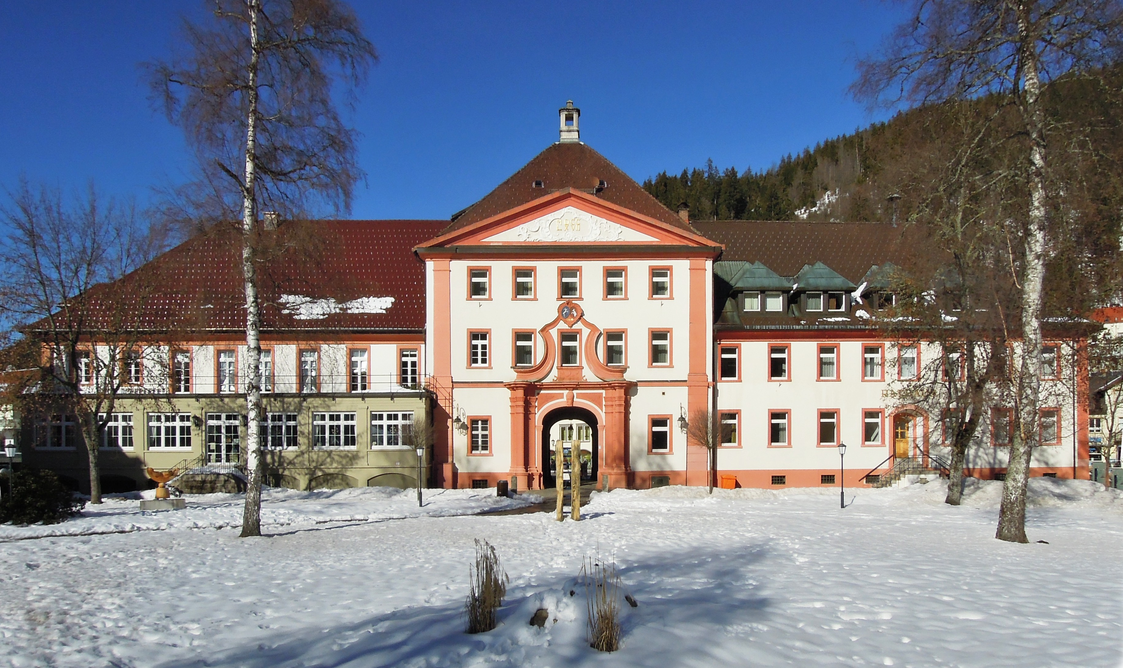 Stadtverwaltung